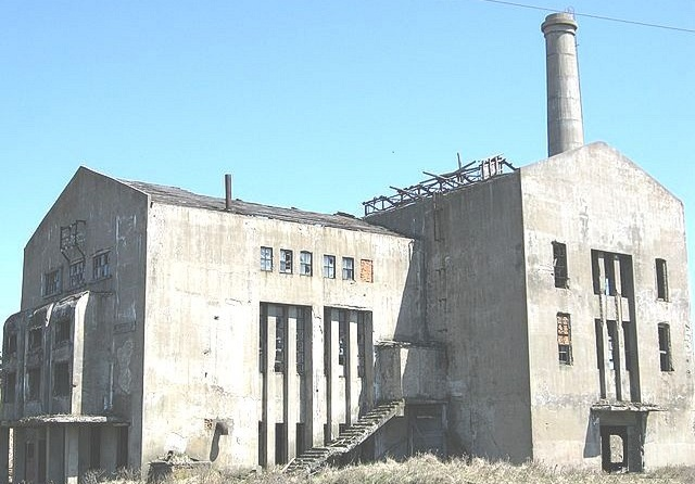 Красногорск, Сахалинская область, здание электростанции на юге города, постройка середины 40-х годов XX века.